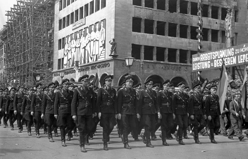 Berlin, Volkspolizei bei 1. Mai Demonstration ADN-ZB/Blunck/1.5.1949; 1. Mai 1949 in Berlin; Volkspolizei im Demonstrationszug Unter den Linden, Ecke Friedrichstr.